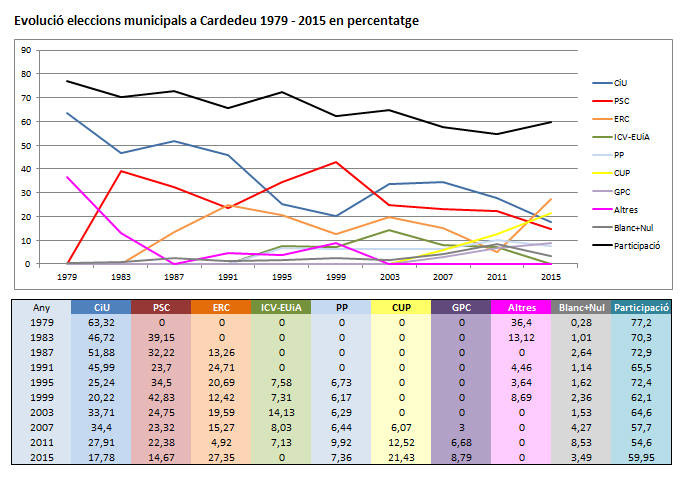 Evolució dels resultats electorals al municipi de Cardedeu (Vallès Oriental) del periode 1979 fins al 2015.